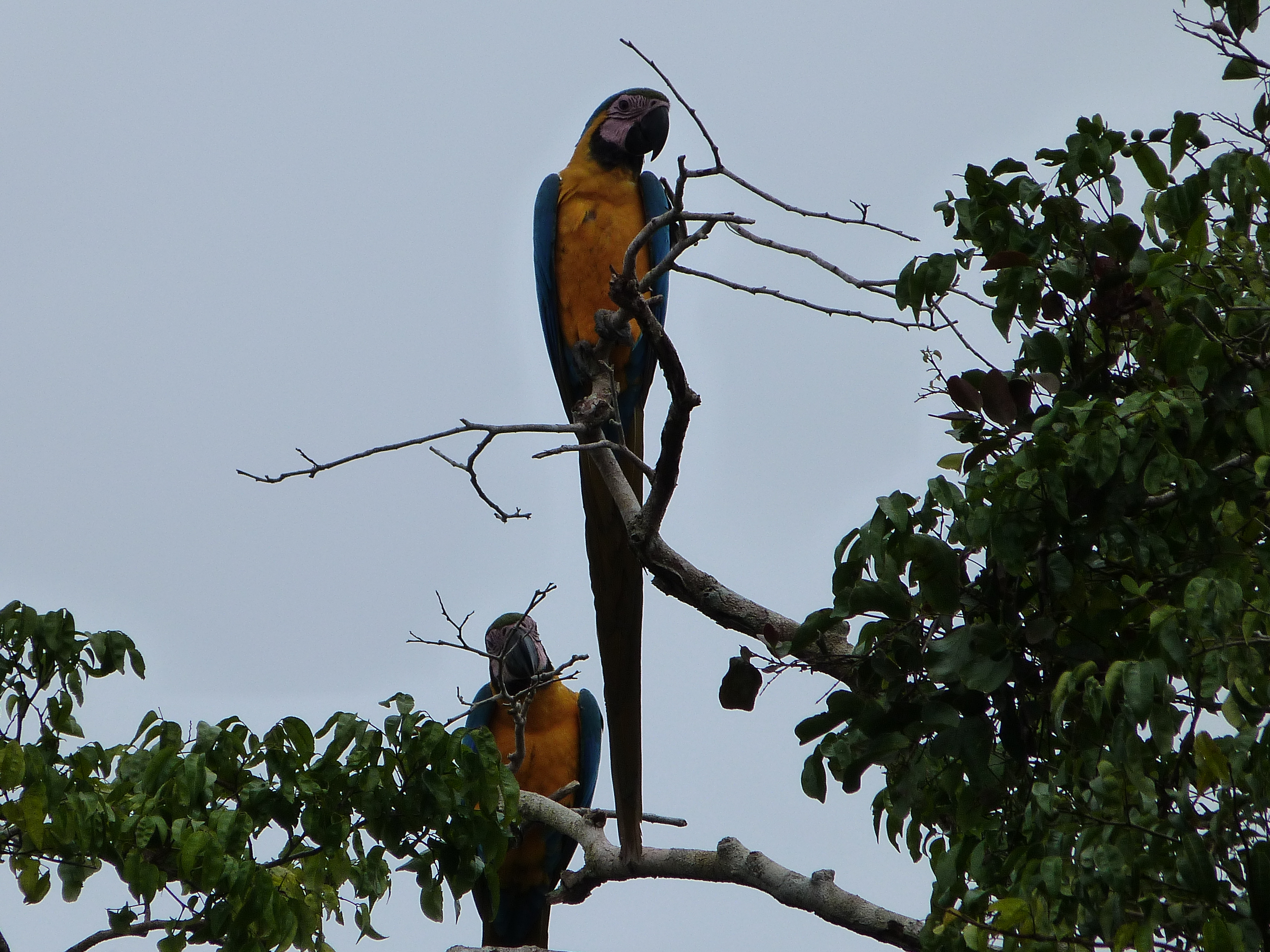 Avifauna amazônica